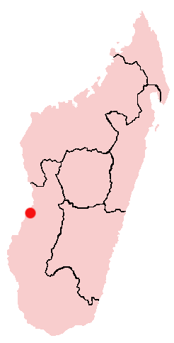 Morondava geography